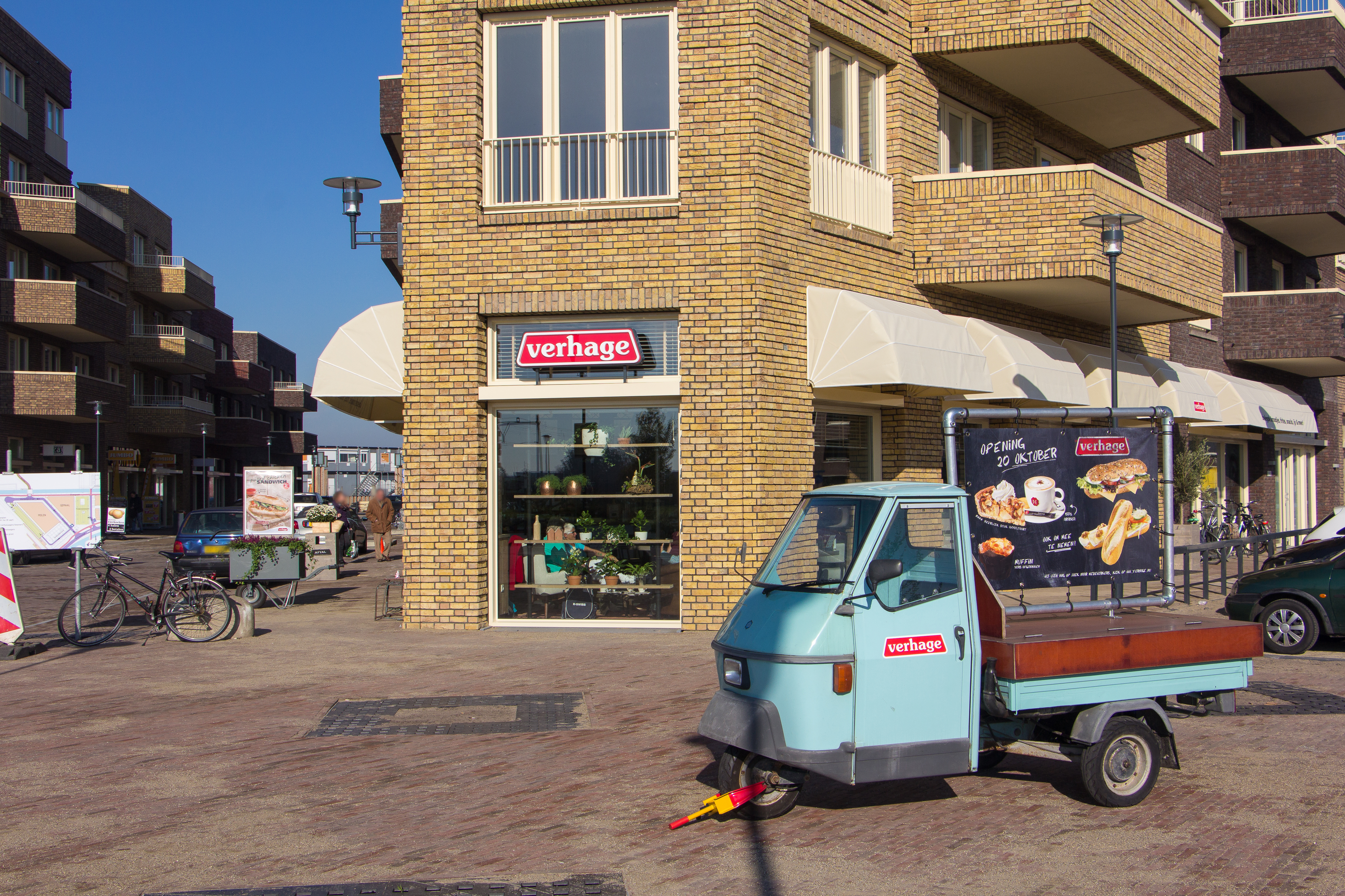 De nieuwste Verhage vestiging in Berkel en Rodenrijs